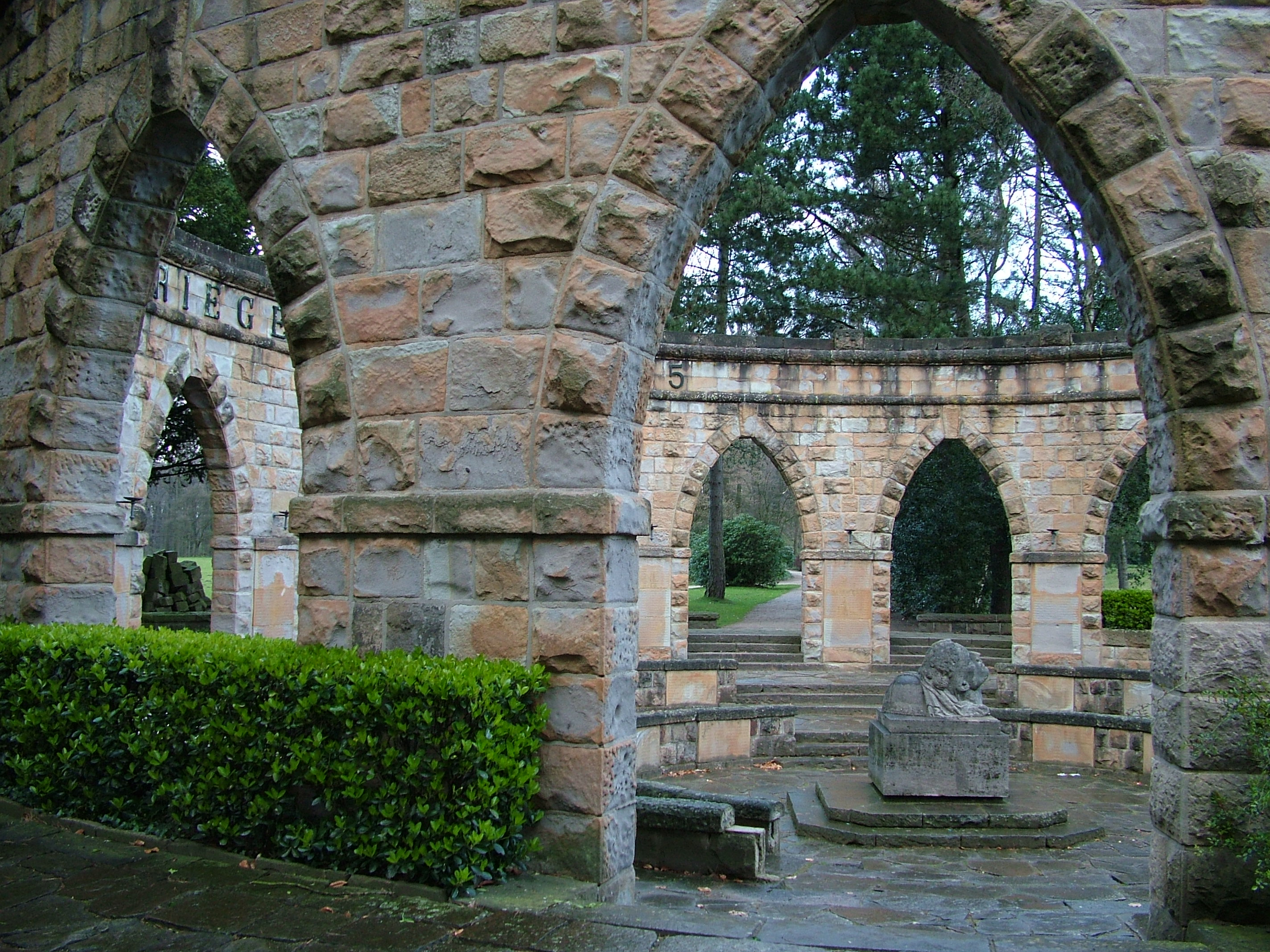 Ehrenmal, Gladbeck, Freizeitstätte Wittringen